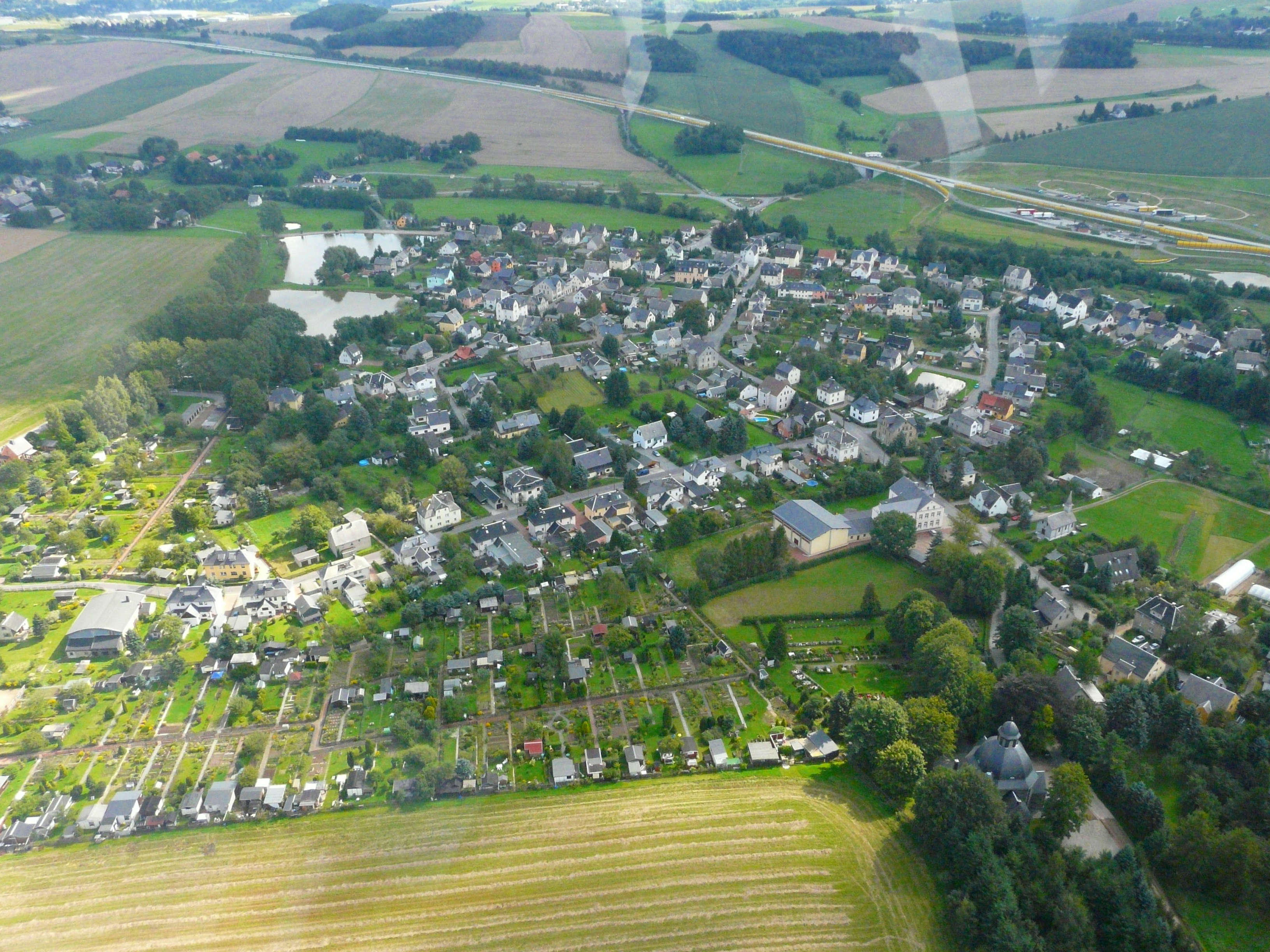 Neuwiese